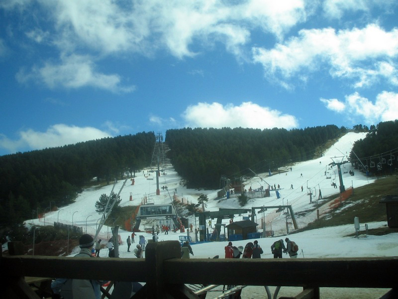 Aragonés: Bardelinars, ambista (Tergüel, Aragón)